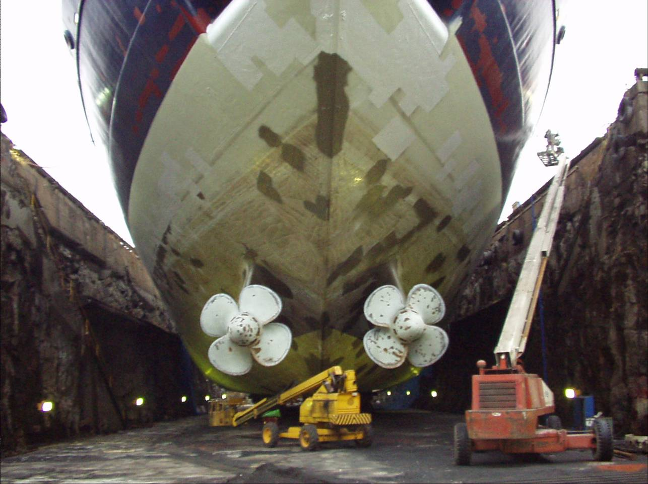 Ymer in Dock in Stockholm